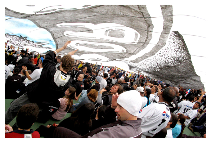 A torcida do Corinthians estende sua enorme bandeira.